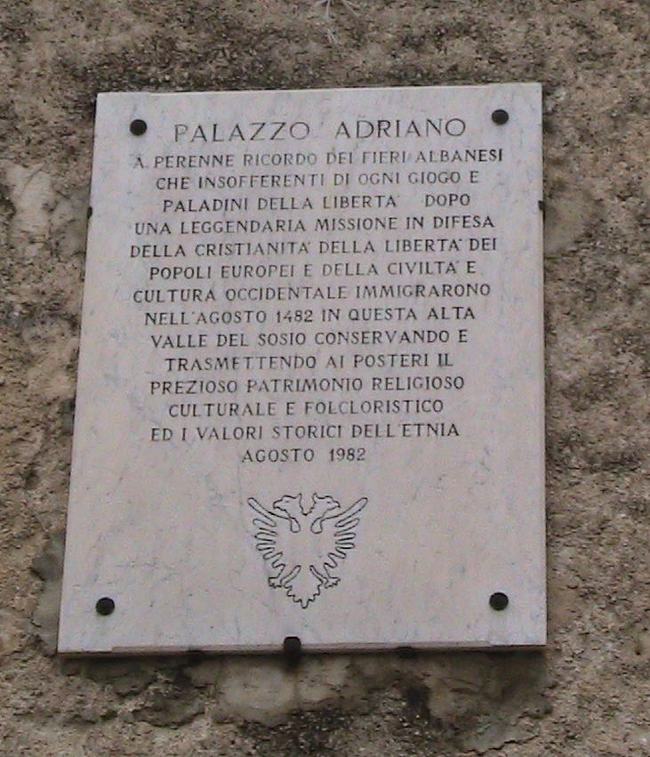 Gedenktafel zum 500. Jahrestag der albanischen Zuwanderung